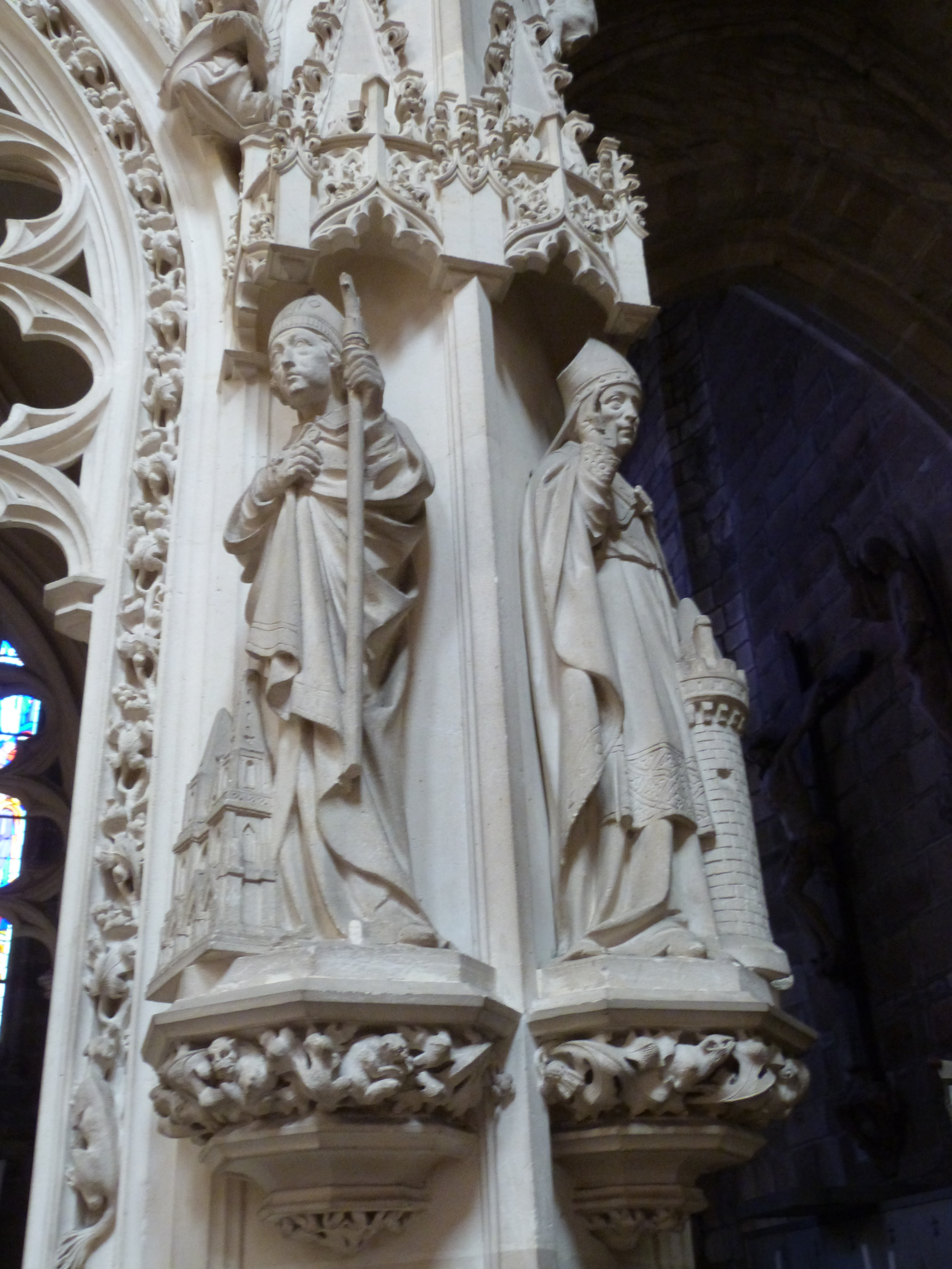 Statues du cénotaphe de saint Yves dans la cathédrale Saint-Tugdual de Tréguier